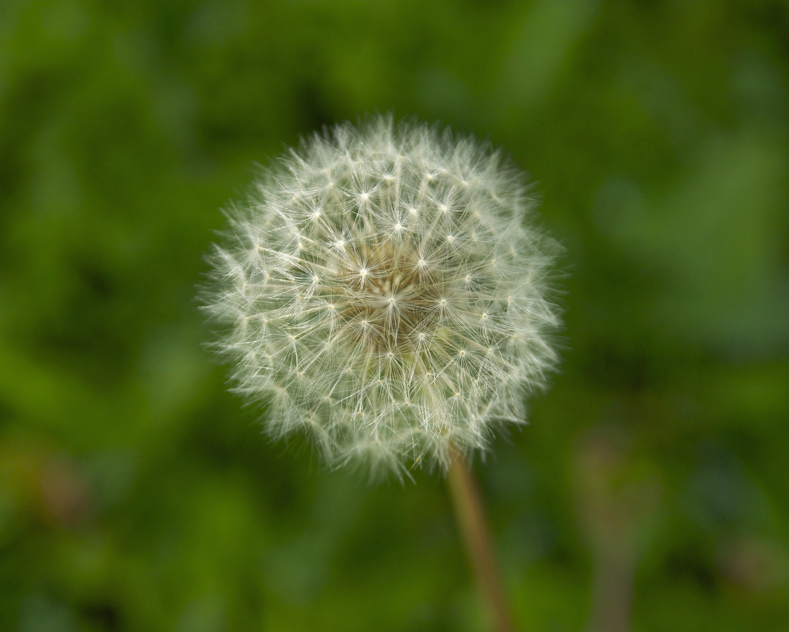 Achenes et pappus de pissenlit (Taraxacum obovatum), Dordogne.Unknown "blown-ball" of dandelion (taraxacum obovatum), dordogne, france.